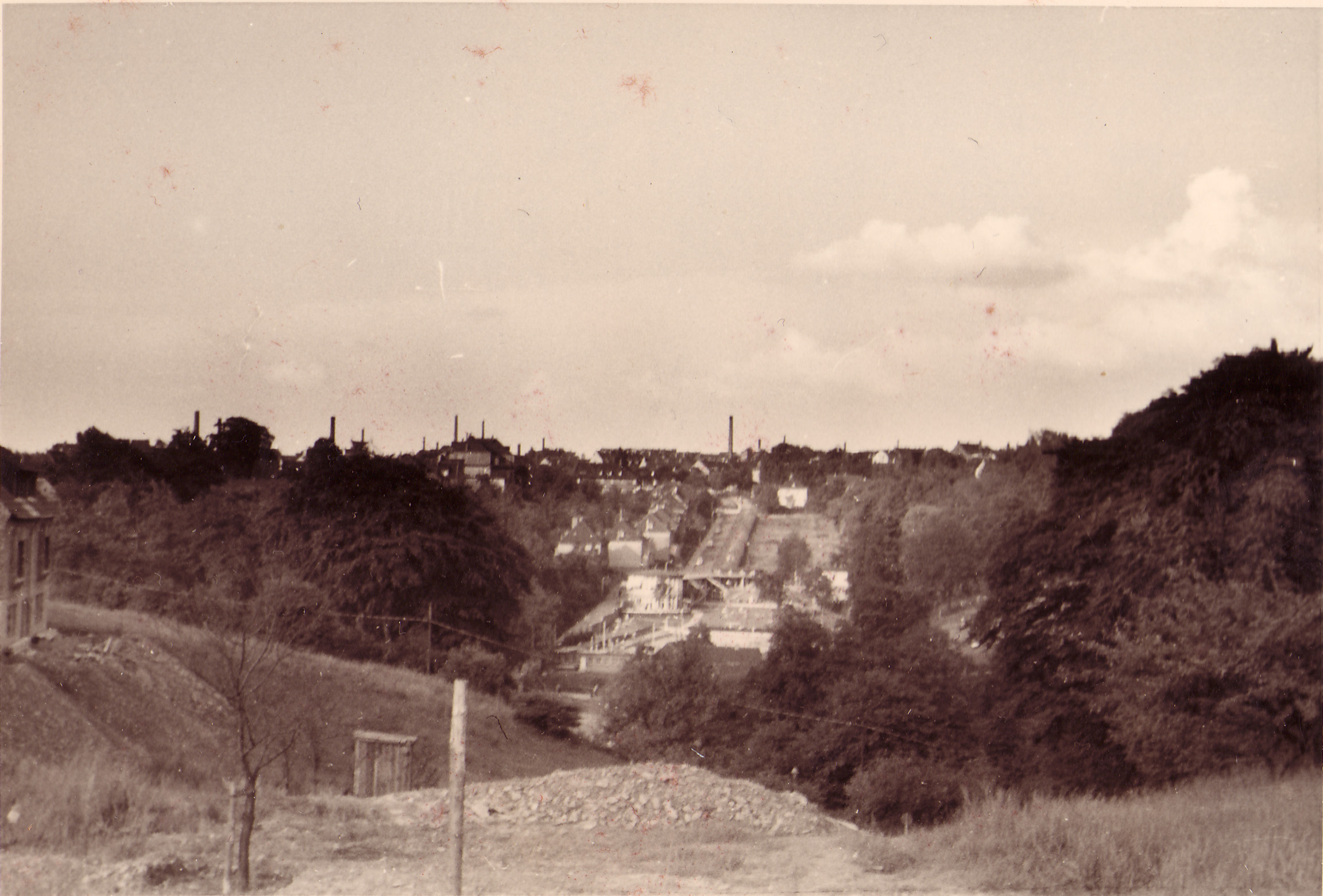 Blick von der Grünheide in Richtung Innenstadt um 1950